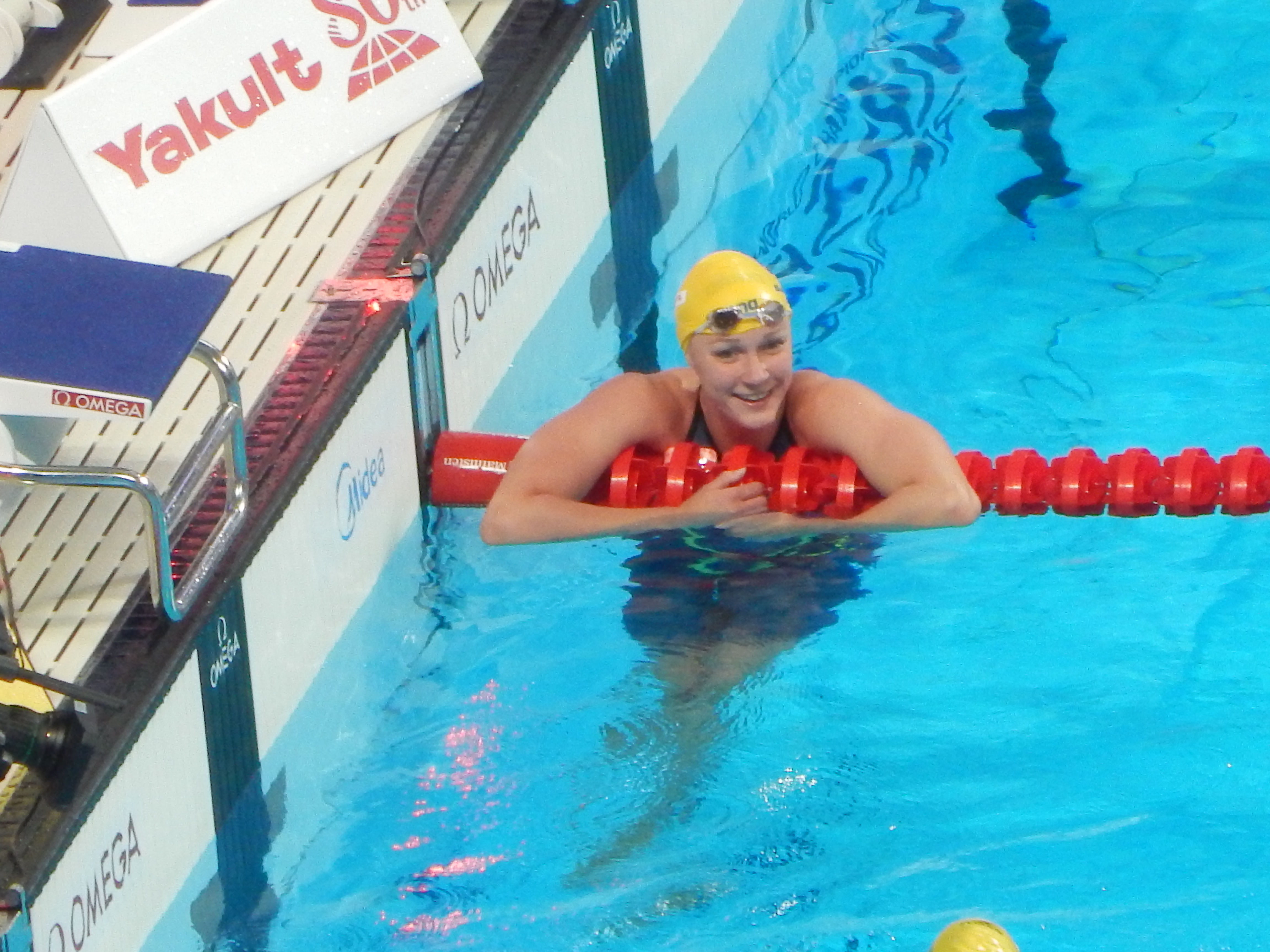 Сара Шёстрём выигрывает бронзовую медаль на дистанции 50 метров вольным стилем в Казани